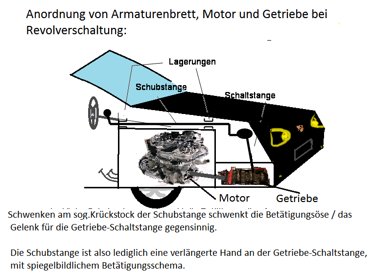 Revolverschaltung